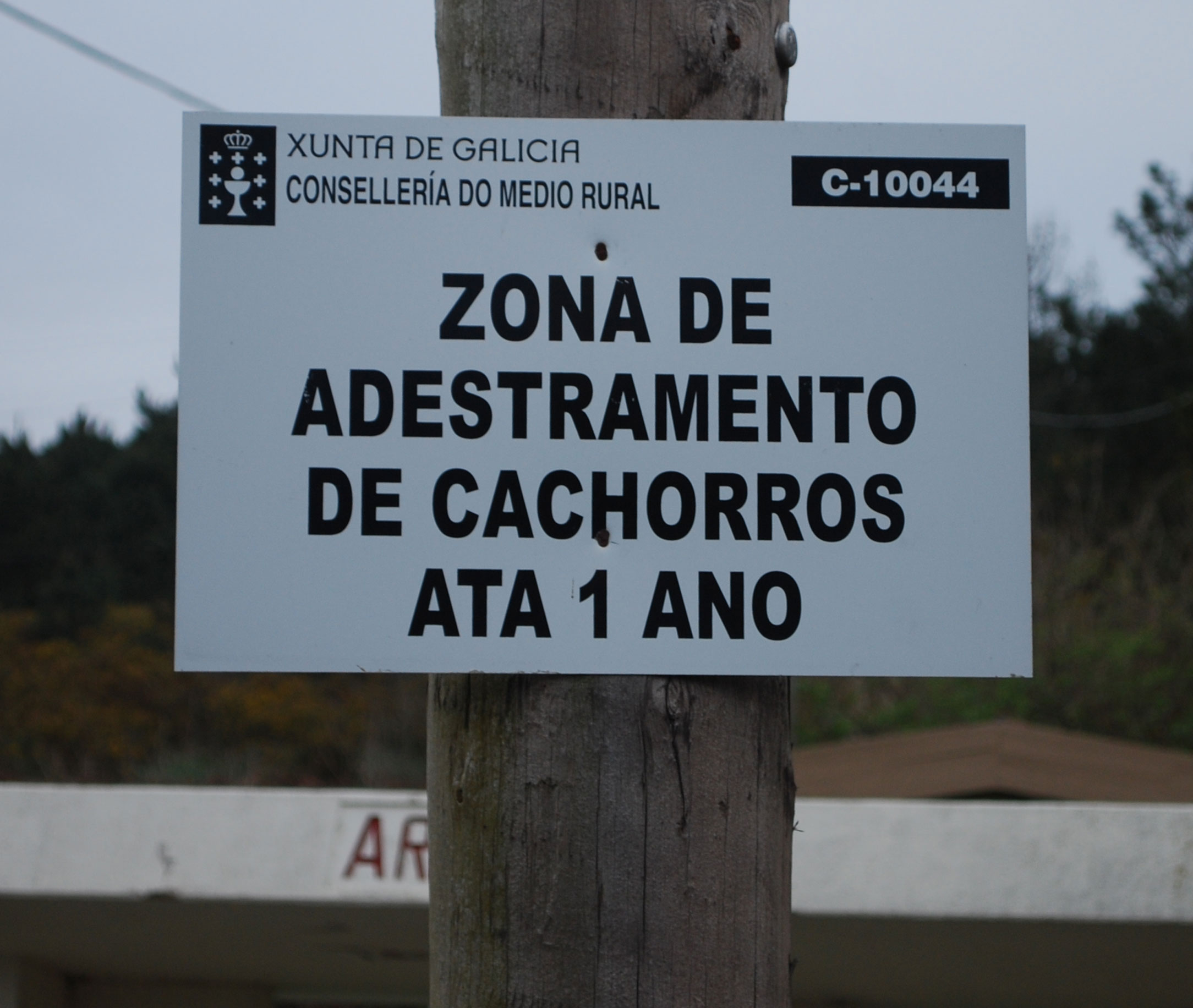 Medio Rural informando á poboación Xunta de Galicia